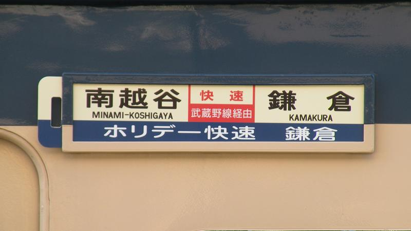 南越谷発着のホリデー快速鎌倉号の横サボ